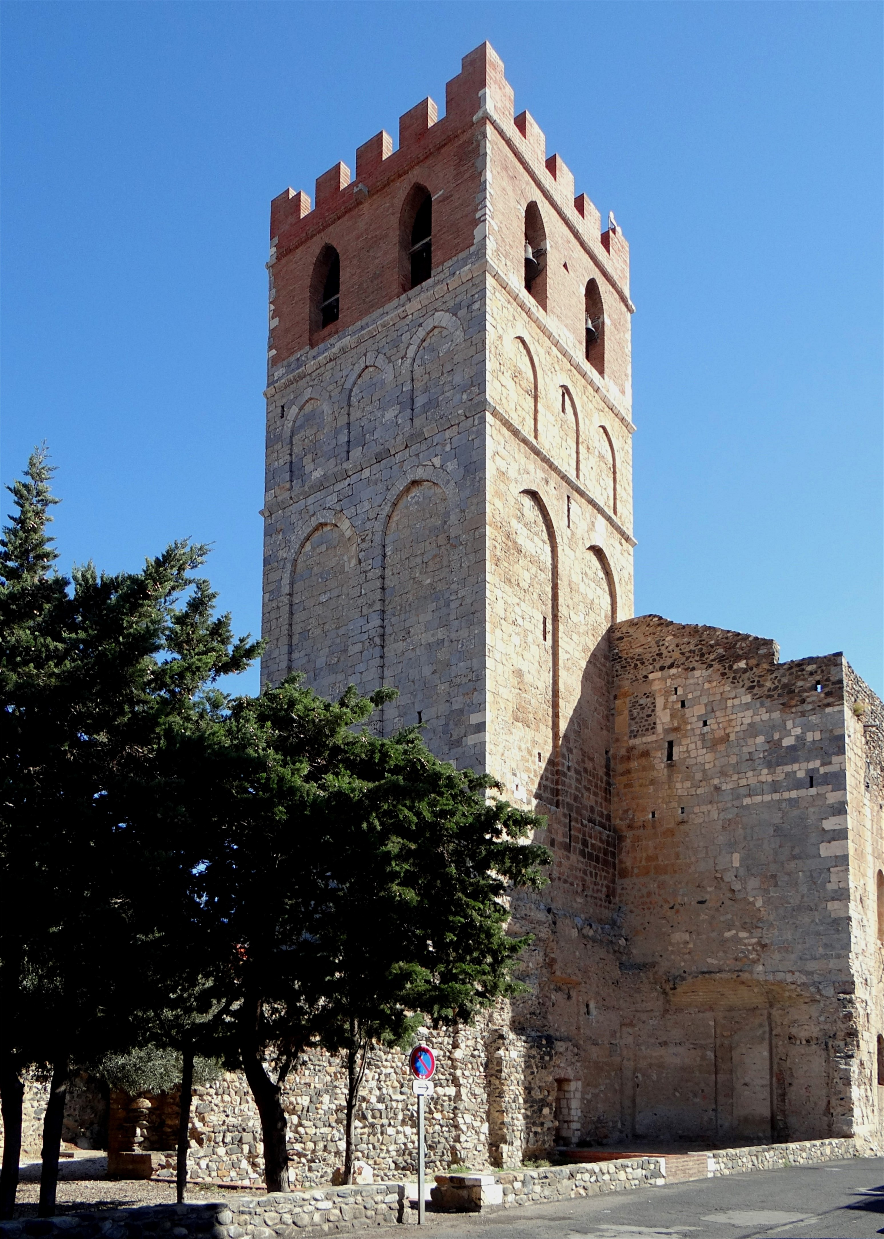 Église Sainte-Marie, Espira-de-l'Agly, Pyrénées-Orientales, France.